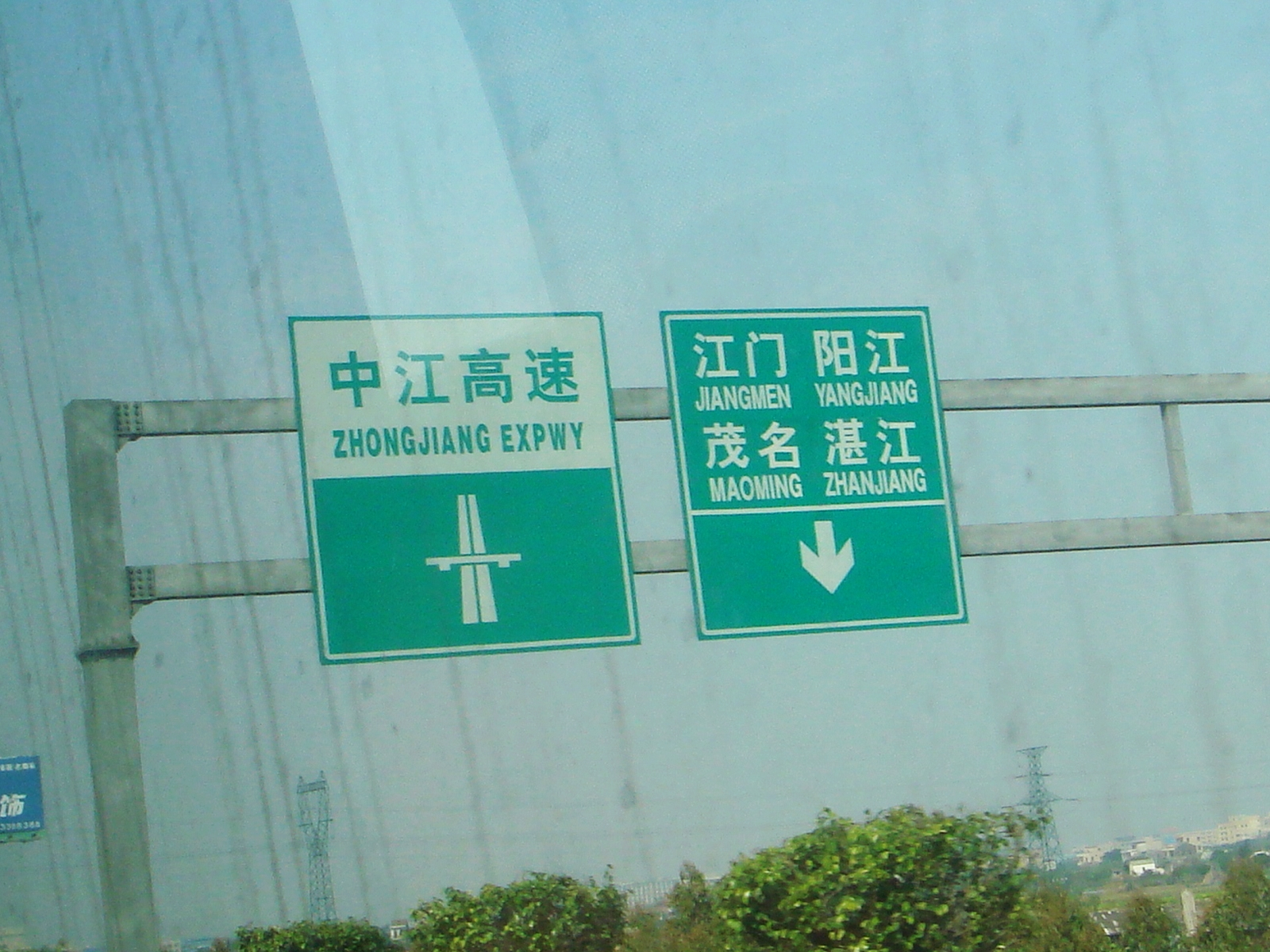 中江高速公路